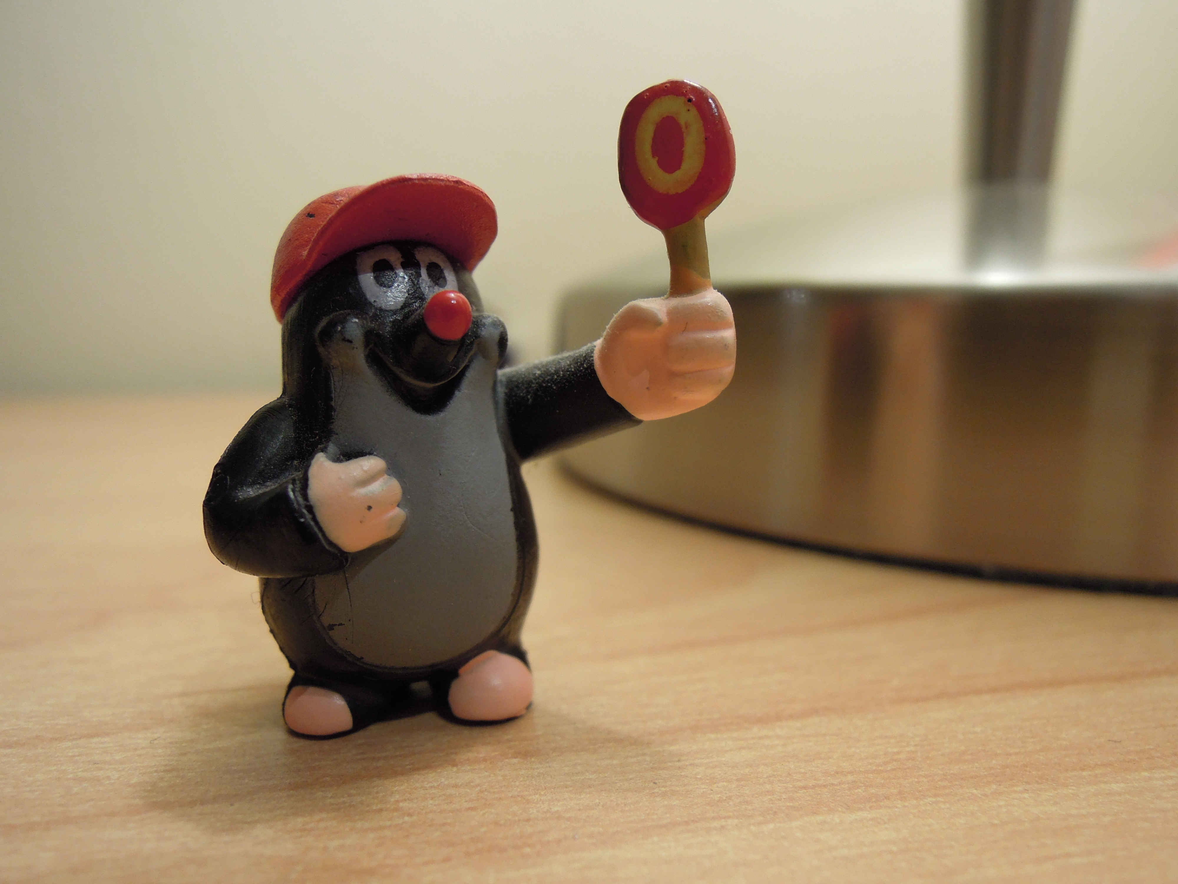 Maulwurfminiatur grinsend - Moltwerper smiling